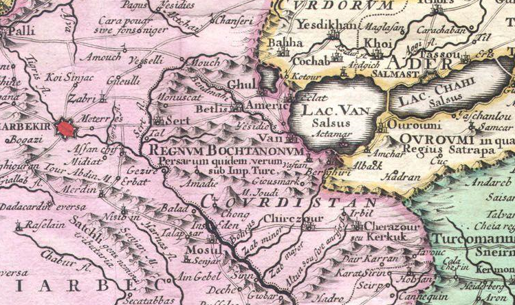 Karte das kurdische Fürstentum Botan (Regnum Bochtanonum) innerhalb des osmanischen Reiches im 18. Jahrhundert auf einer europäischen Karte.